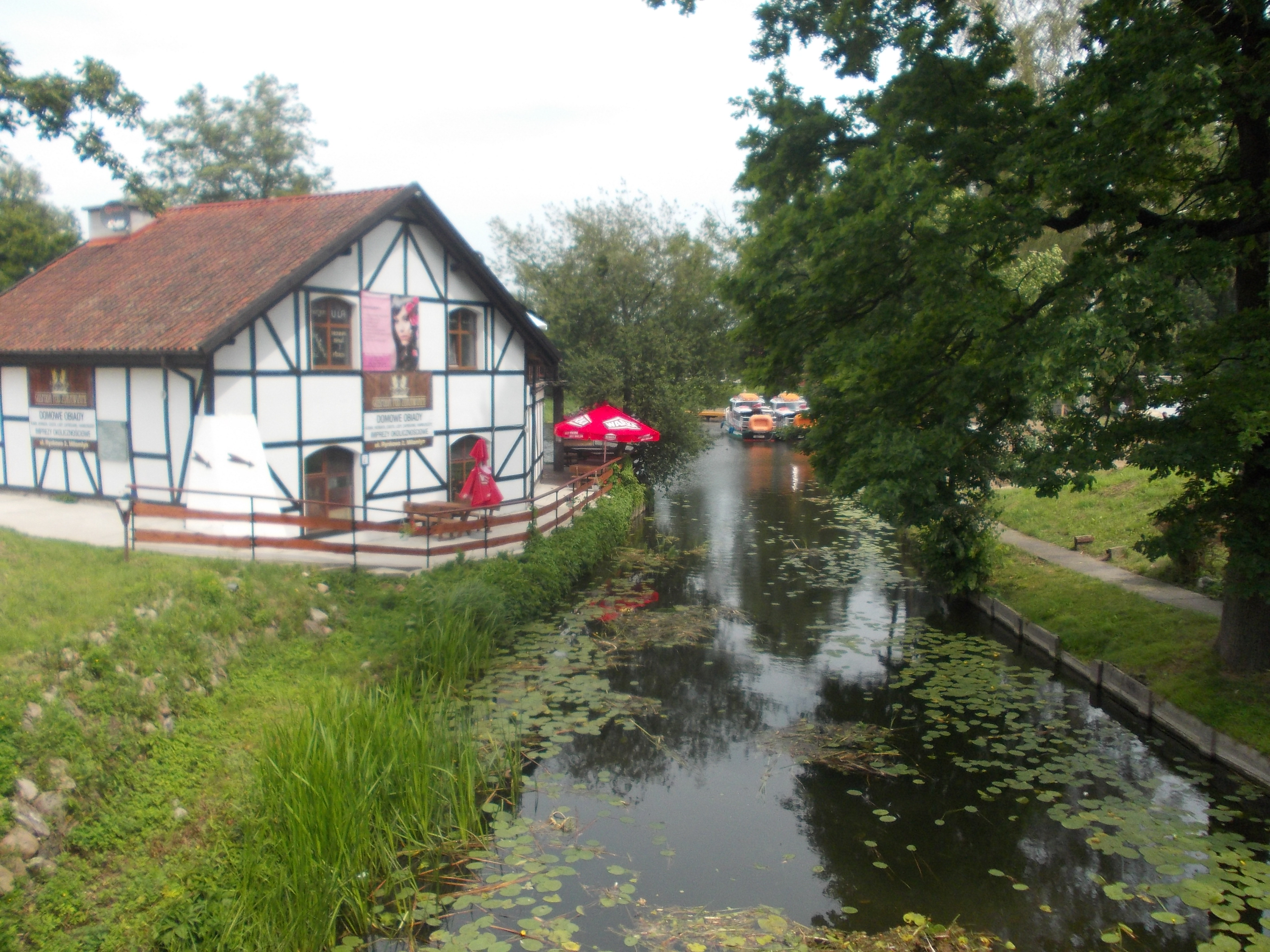 Budynek nad kanałem - Miłomłyn